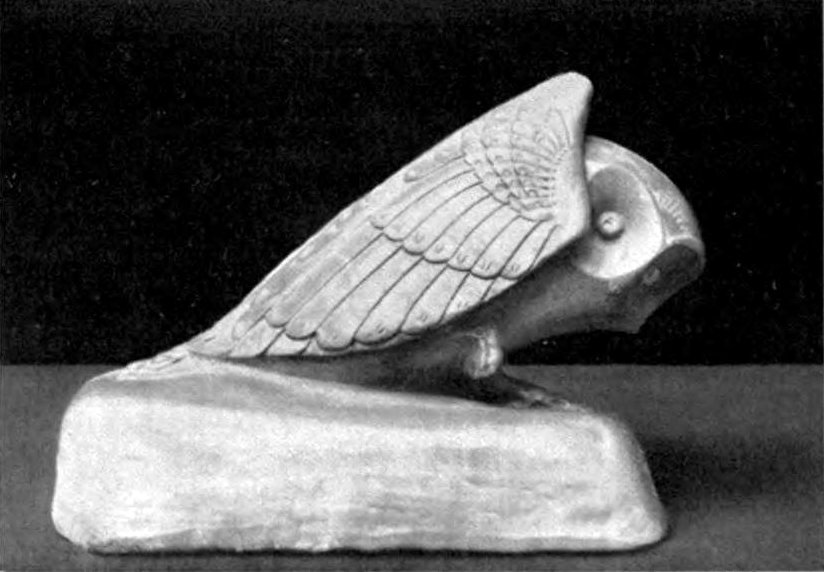 Chouette, céramique